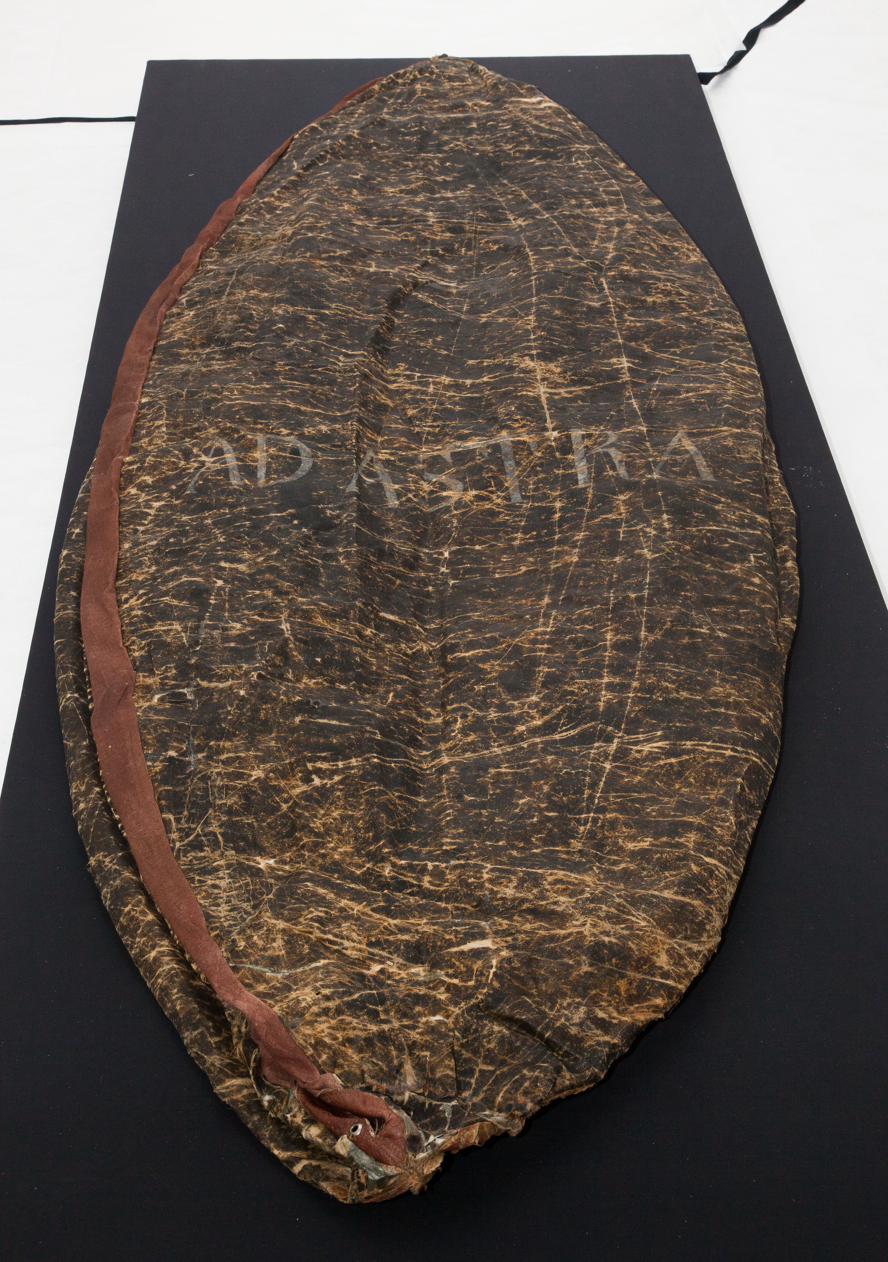 Ad AStra: Hülle des Ballons von 1784. Gut erkennbar der Schriftzug „Ad Astra“. Die Hülle befindet sich heute im Städtischen Museum Braunschweig (SMBS)